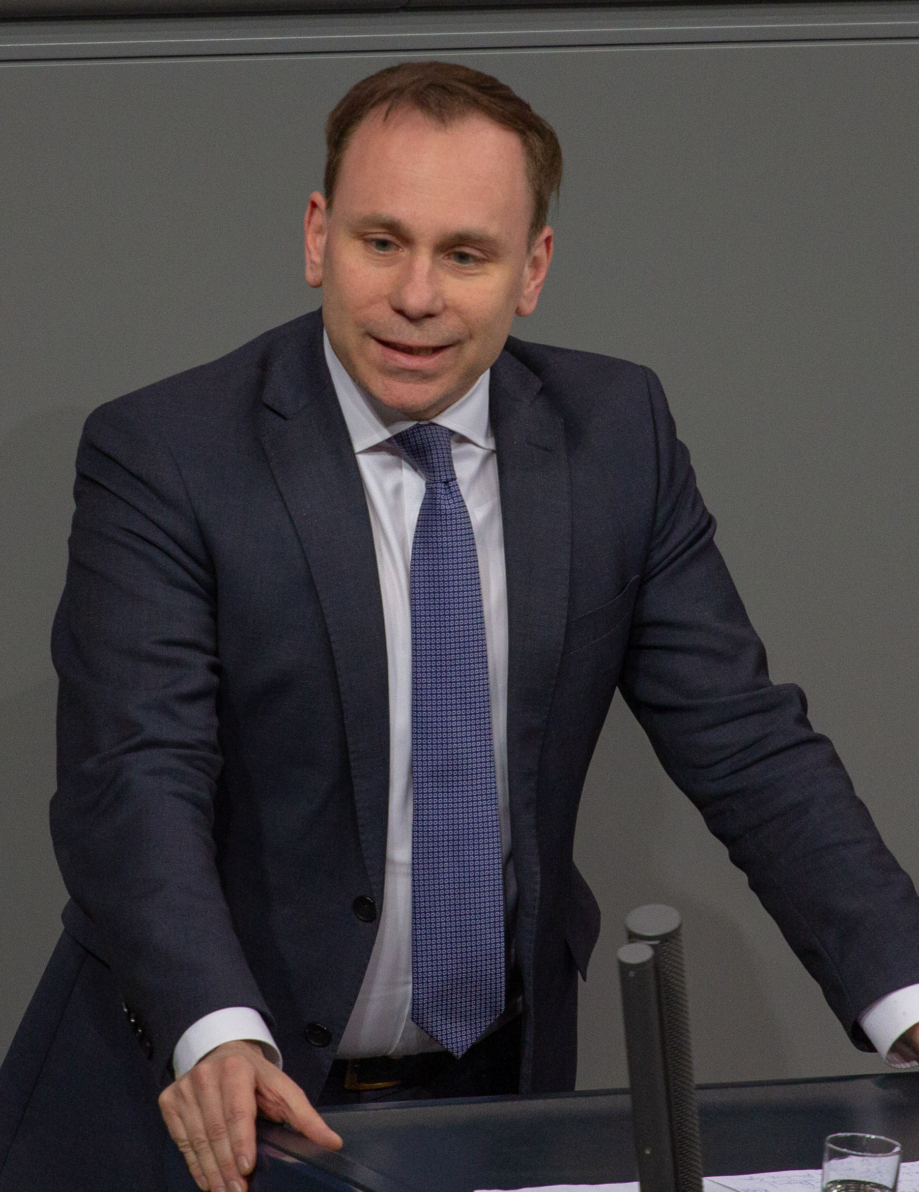 Volker Ullrich, Mitglied des Deutschen Bundestages, während einer Plenarsitzung am 11. April 2019 in Berlin.